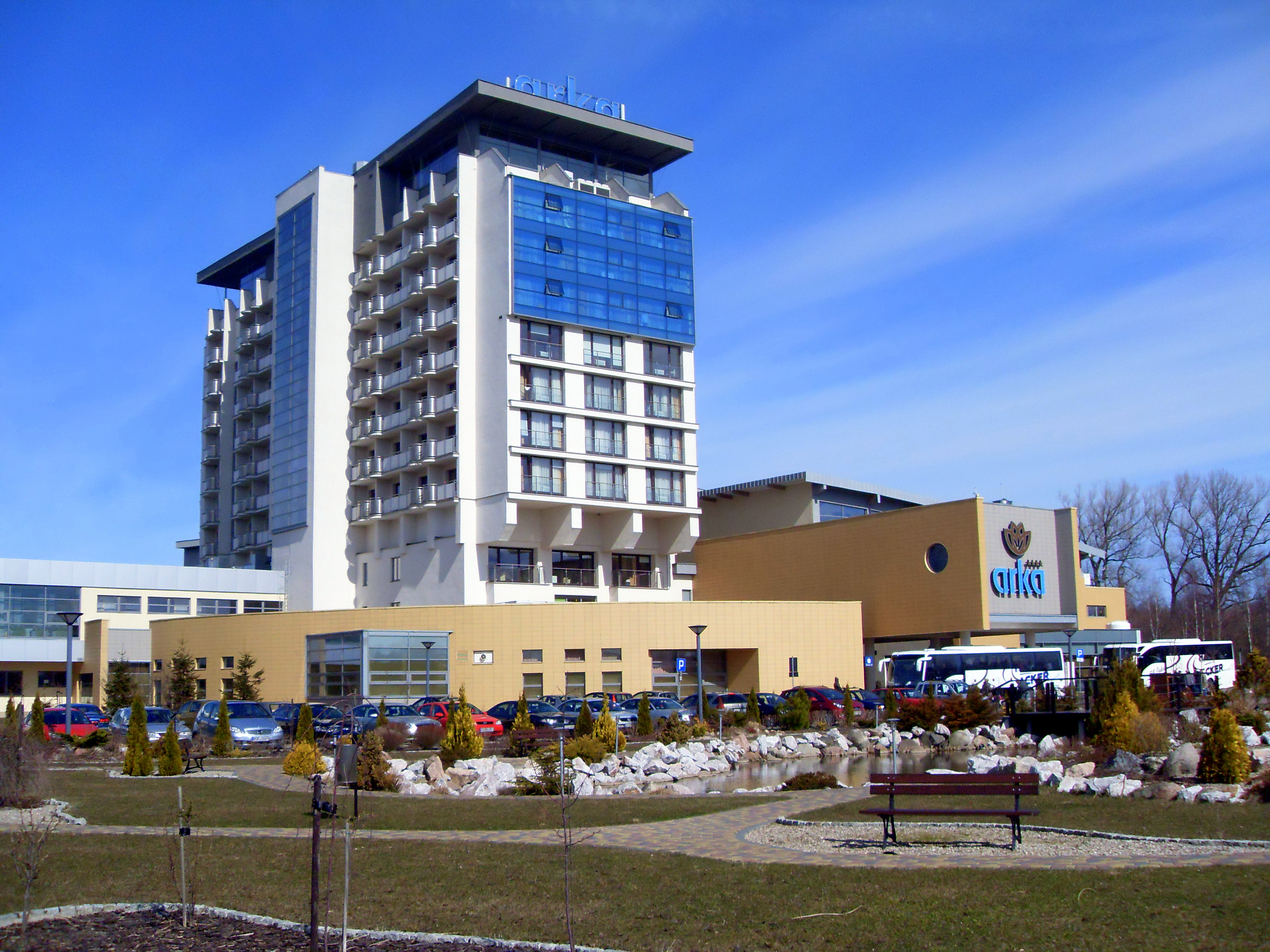 Hotel Arca Medical Spa w Kołobrzegu